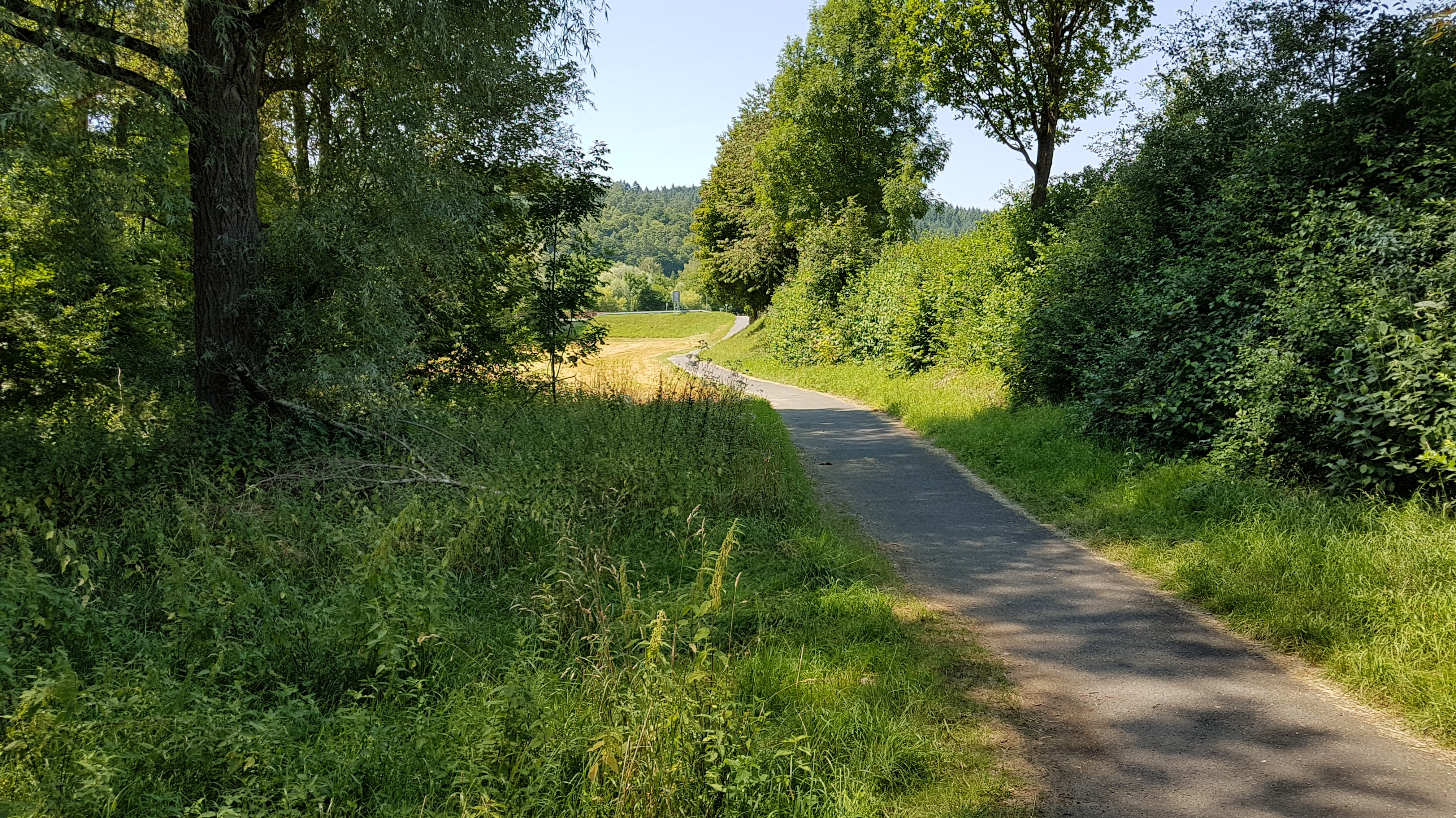 Der Brehmbachtalradweg am Bahnhof Dittwar. Auf der linken Seite verläuft der Brehmbach, rechts die B27.